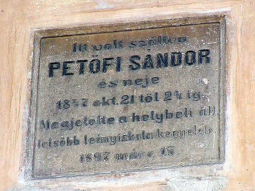 Cluj-Napoca, placă comemorativă pe fostul Hotel Biasini, str.Avram Iancu nr.20